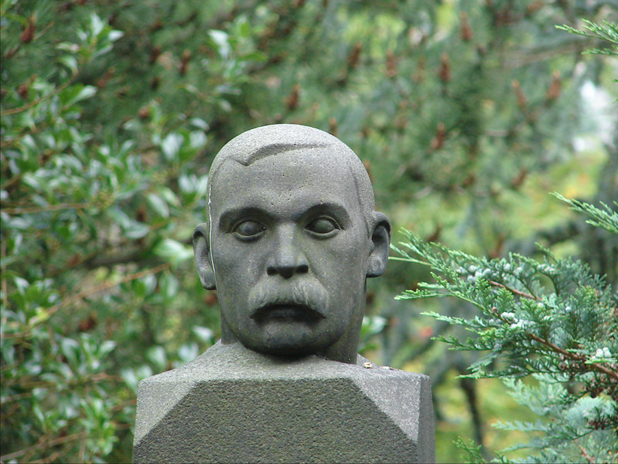 Sigbjørn Obstfelder, gravminne, Frederiksberg kirkegård